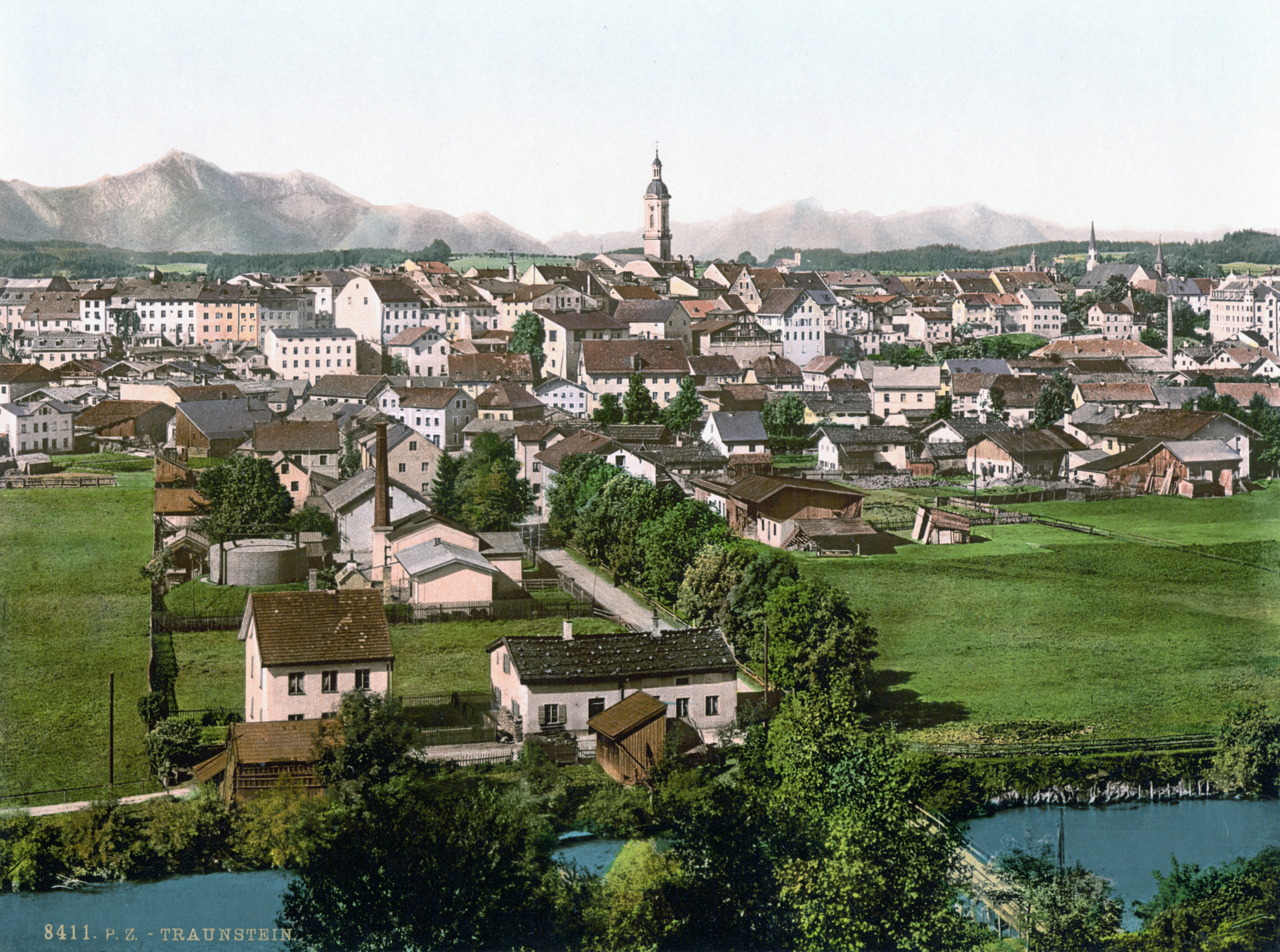 Traunstein, Postkarte